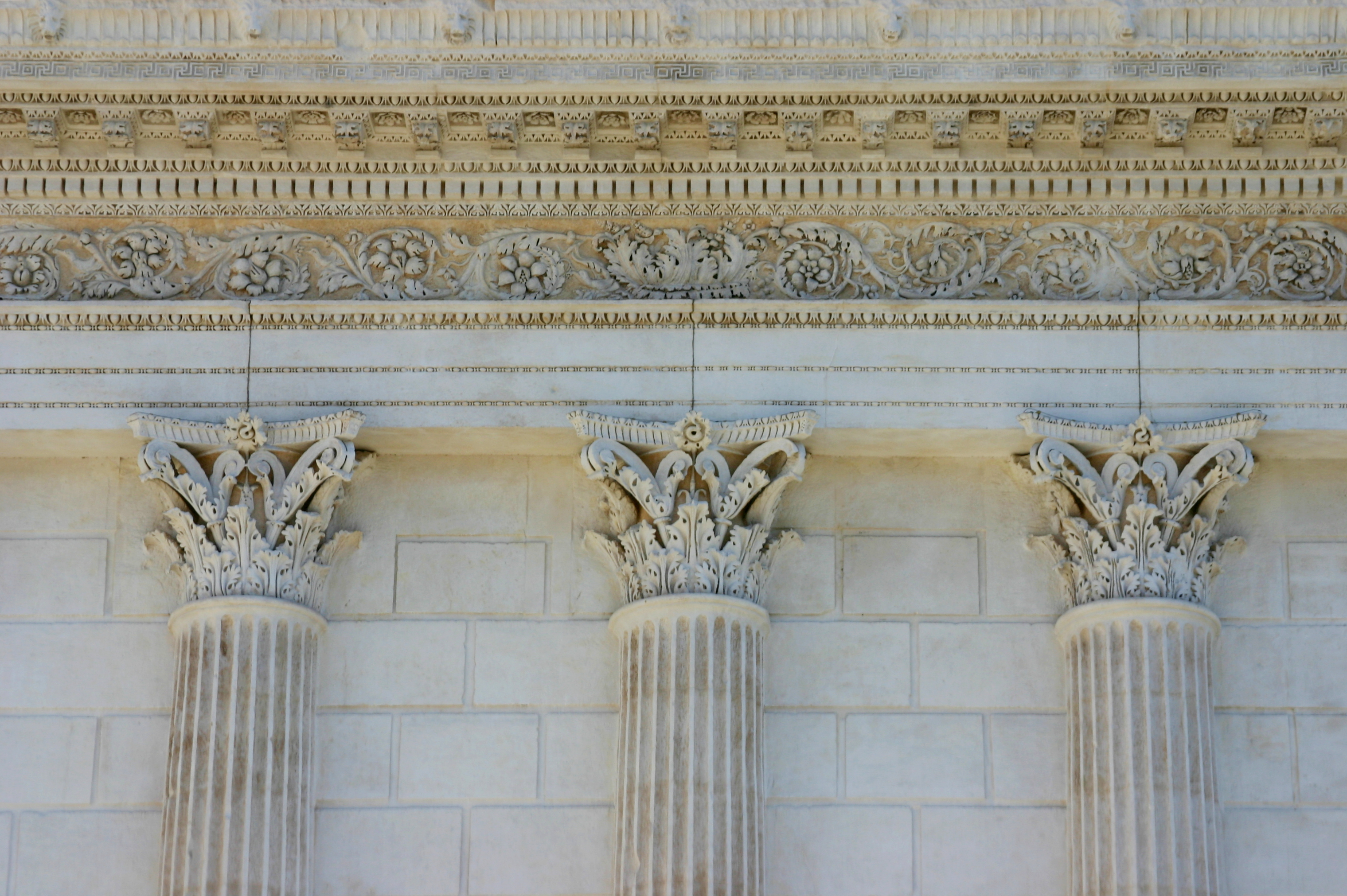 Maison CarrèeСаха тыла: Maison Carrèe